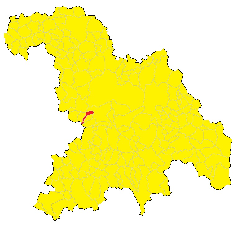 Map of comune of Borgoratto Alessandrino (AL).